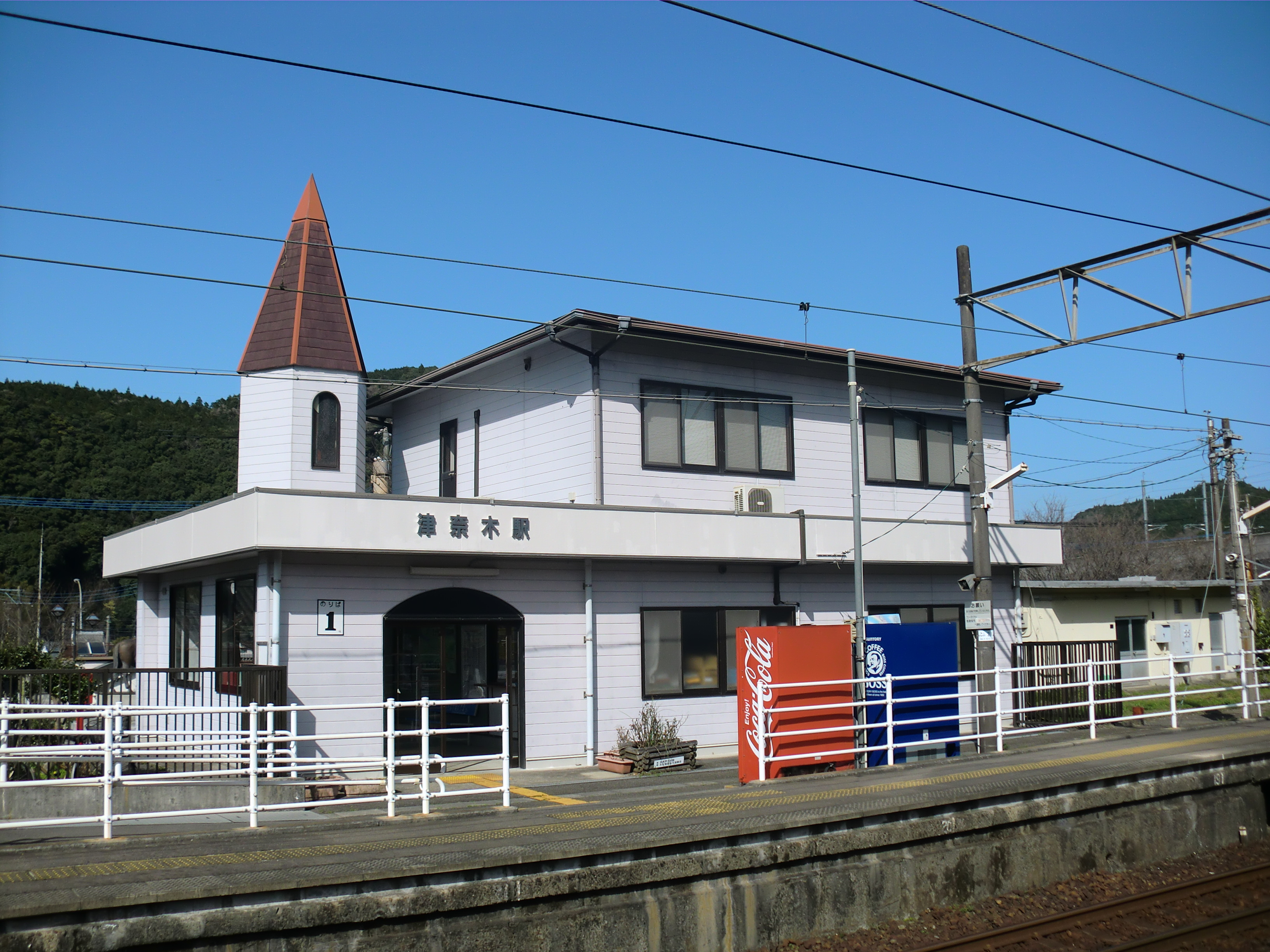 肥薩おれんじ鉄道津奈木（つなぎ）駅の駅舎（2番ホームから撮影）